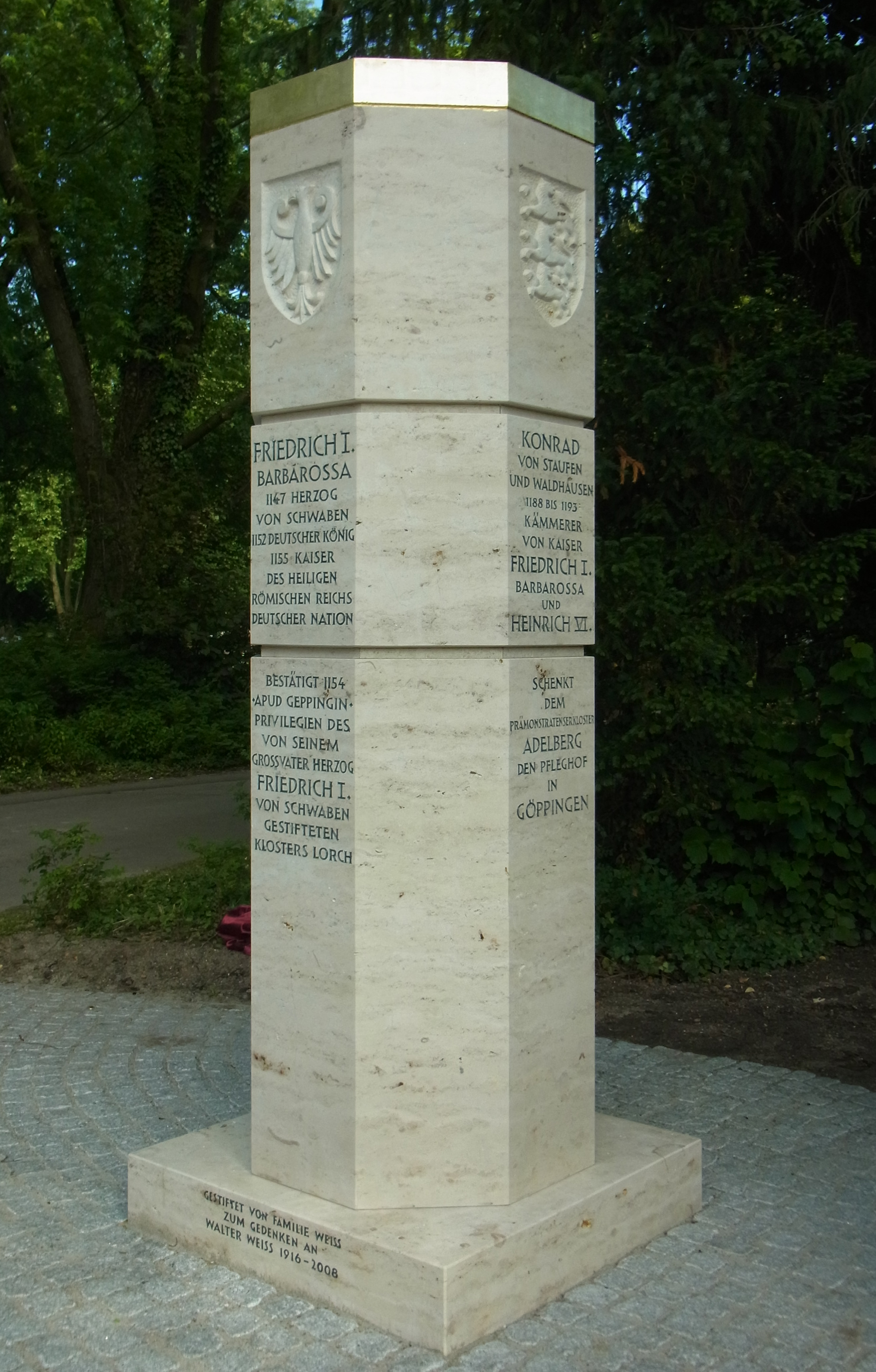 Göppingen - Stauferstele